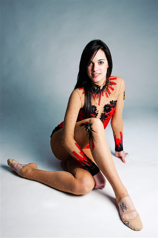 Bet Salom durante una sesión fotográfica en el estudio en febrero de 2009.